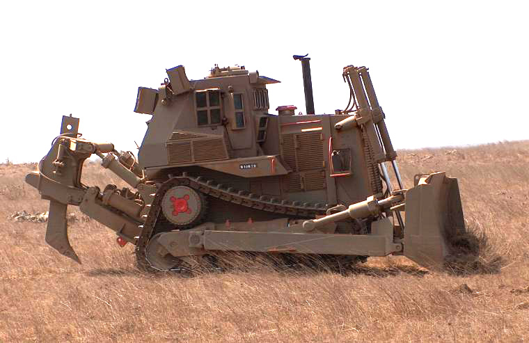 IDF armoured Caterpillar D9L דחפור די-9אל משוריין